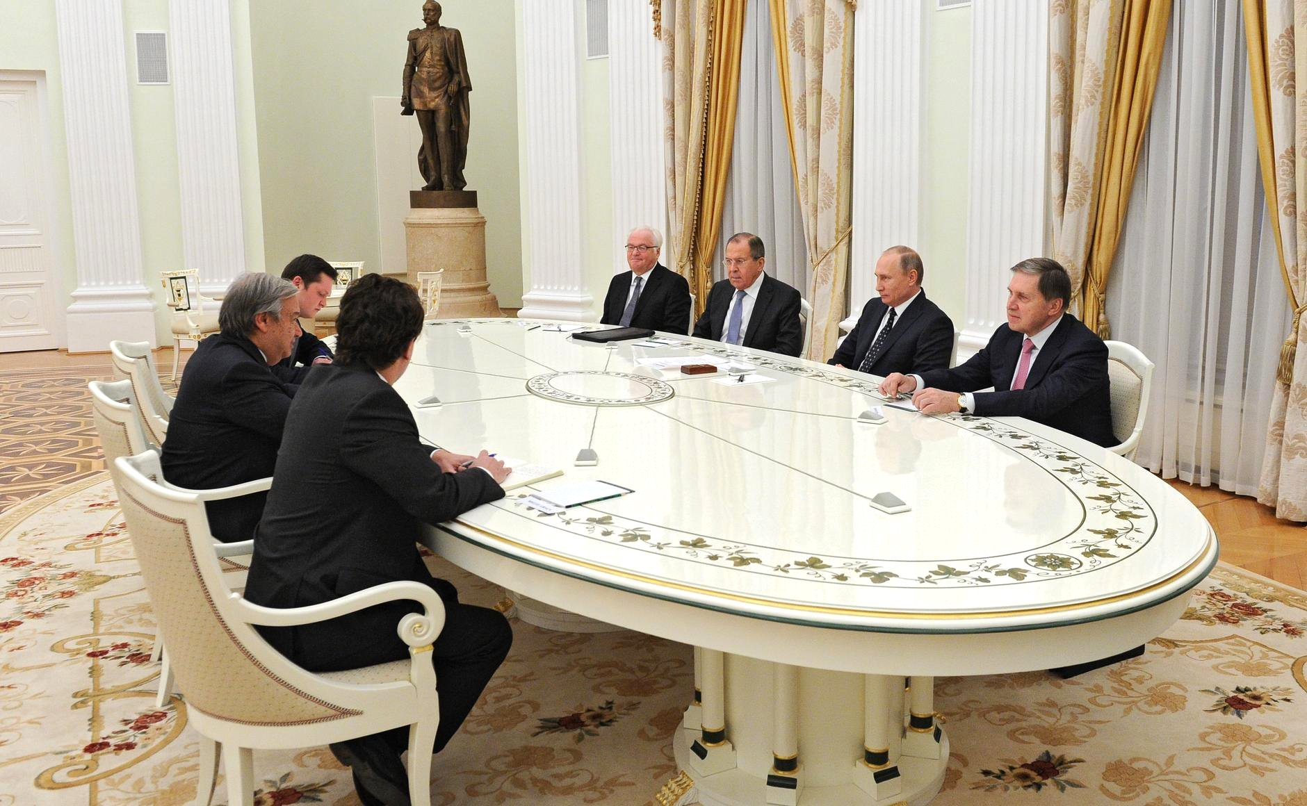 Встреча с избранным Генеральным секретарём Организации Объединённых Наций Антониу Гутеррешем.